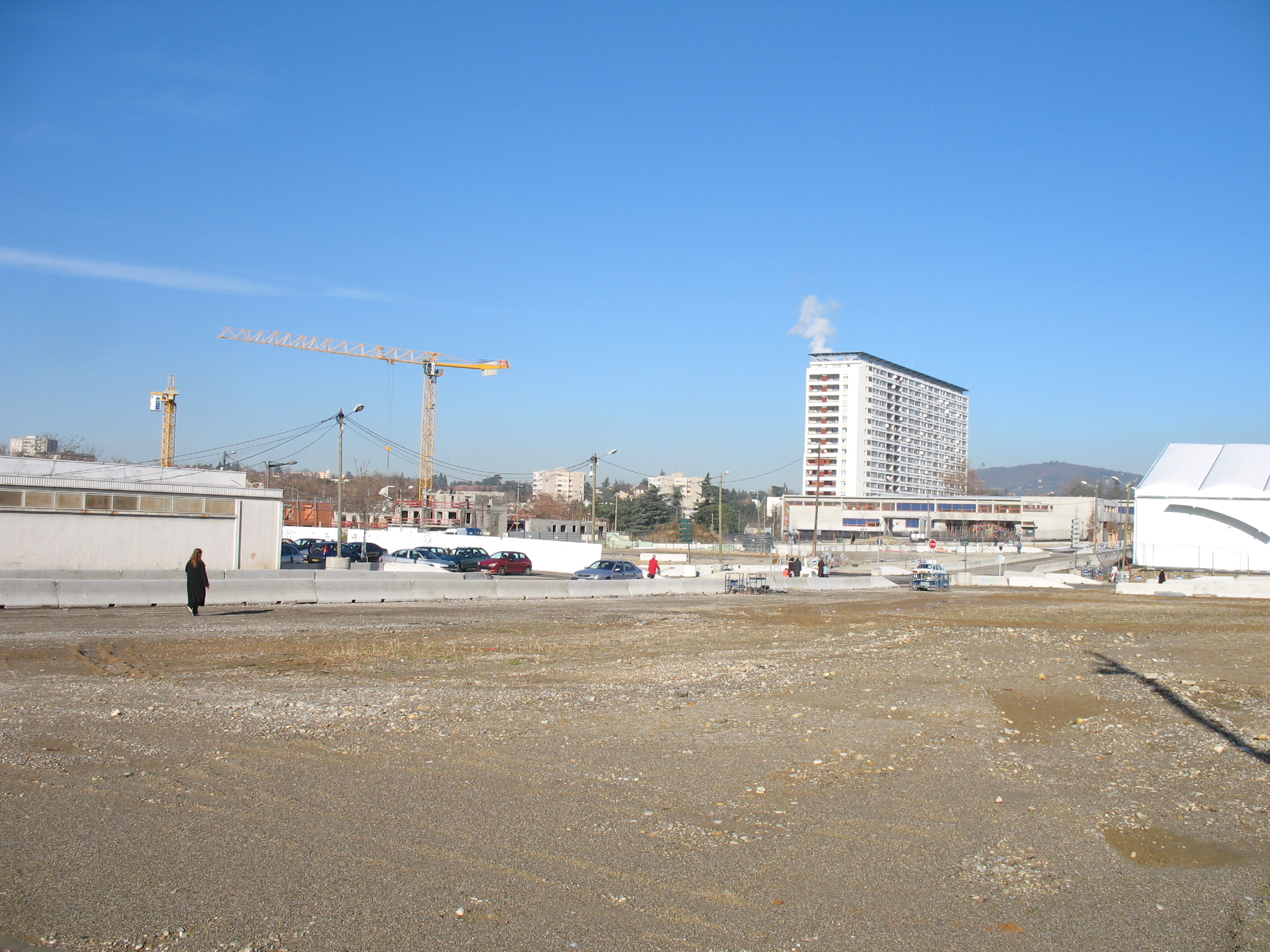 Les premières constructions de logements à La Duchère, à Lyon. A gauche de la moitié restante de l'ancienne barre "200" qui a été réhabilitée, se dressent deux chantiers de logements neufs. Parmi eux, une résidence pour étudiants.